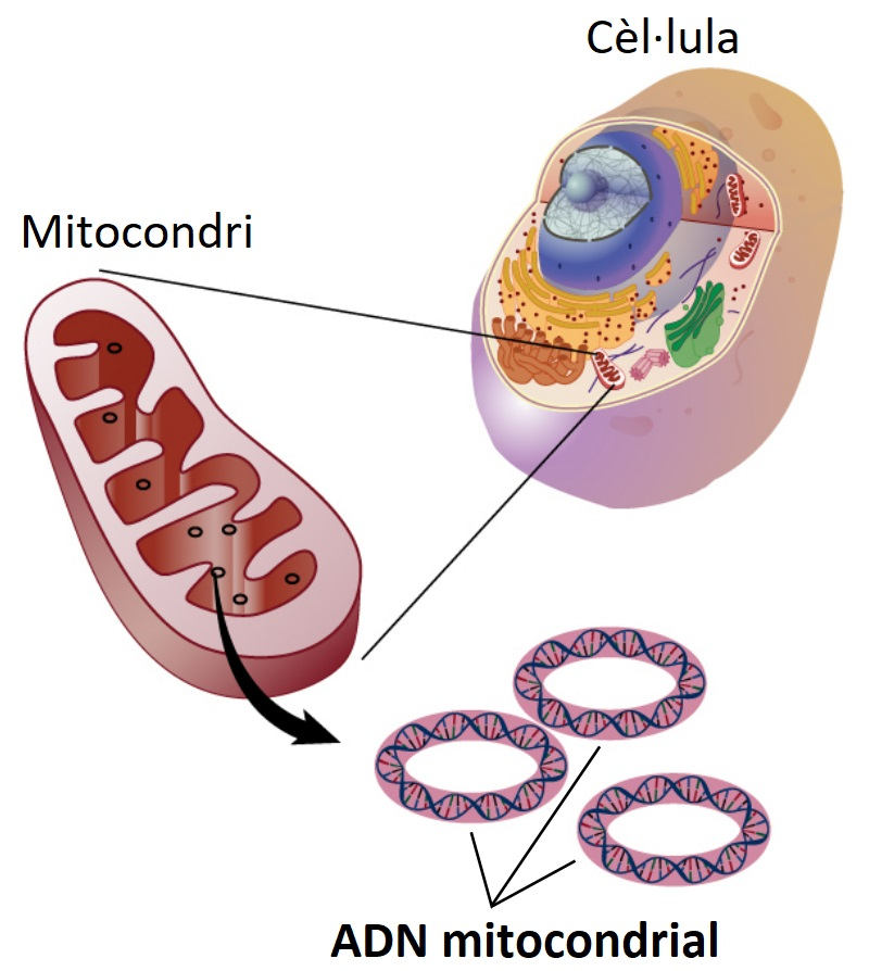 L?ADn mitocondrial és el petit cromosoma circular que es troba a l'interior dels mitocondris. Els mitocondris són orgànuls que es troben a les cèl·lules i que tenen la funció de produir energia. Els mitocondris i, per per extensió l'ADN mitocondrial, es transmeten de la mare als fills.